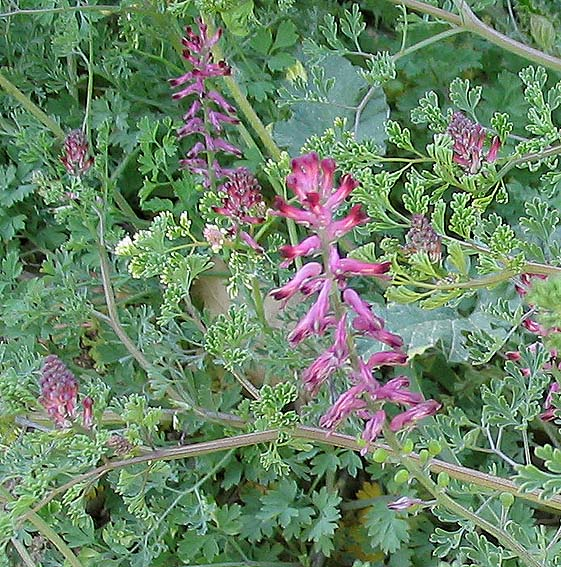 *Fumeterre (Fumaria officinalis) Photo Jean Tosti (12/04/04) Licence GFDL Jean Tosti 12/04/04